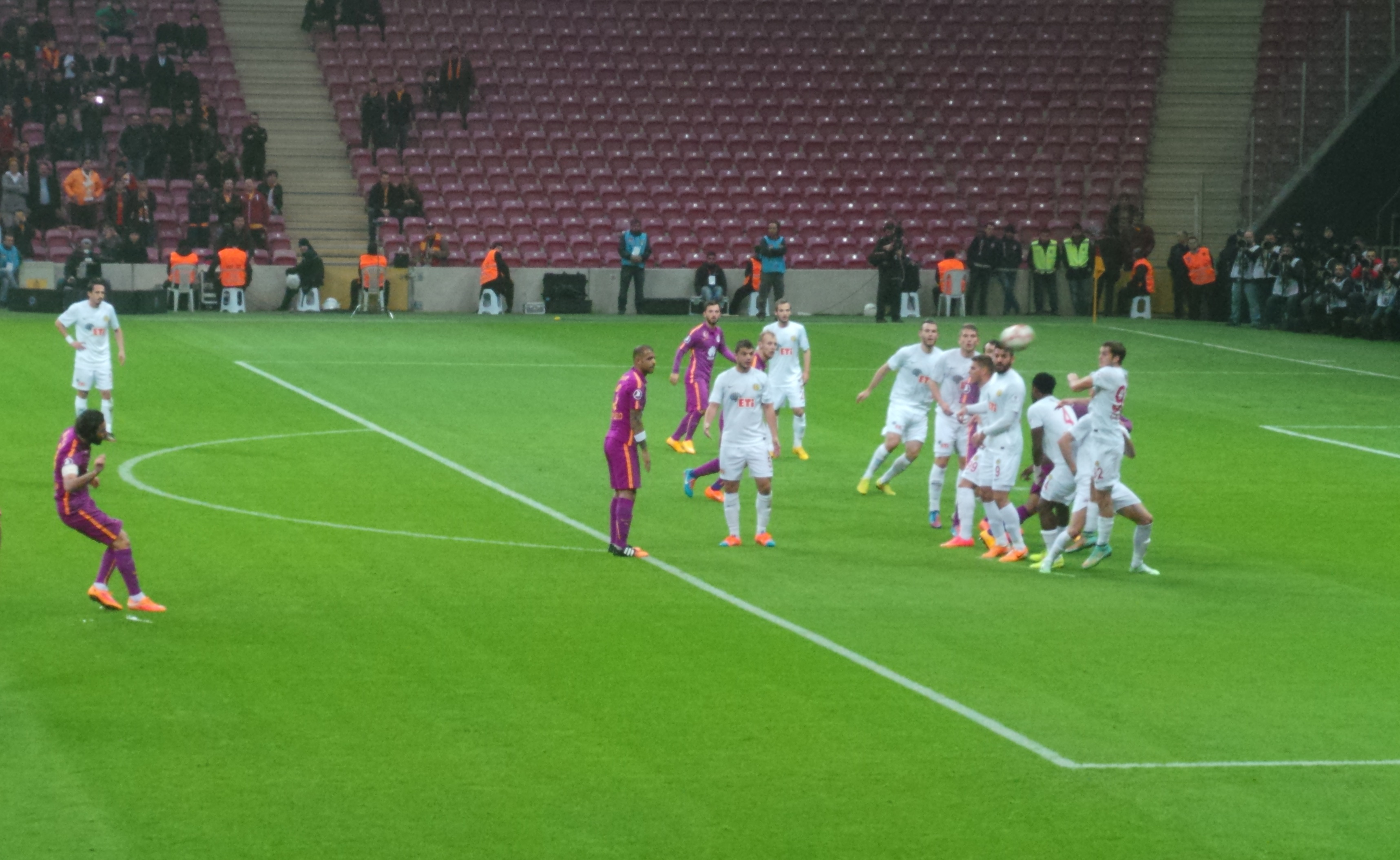 Selçuk İnan'ın Eskişehirspor'a Türkiye Kupası'nda attığı frikik golü